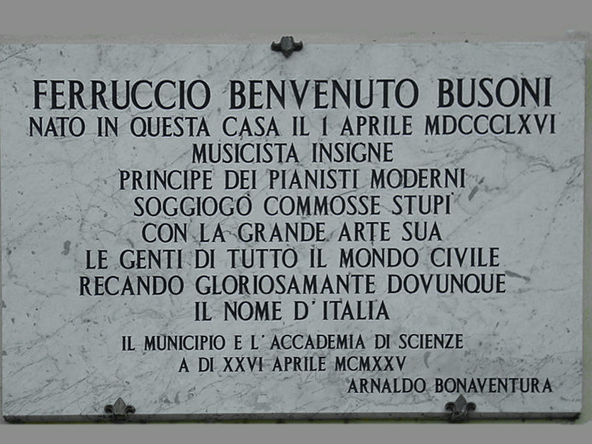 Lapide commemorativa posta sulla facciata del Museo Casa Busoni a Empoli